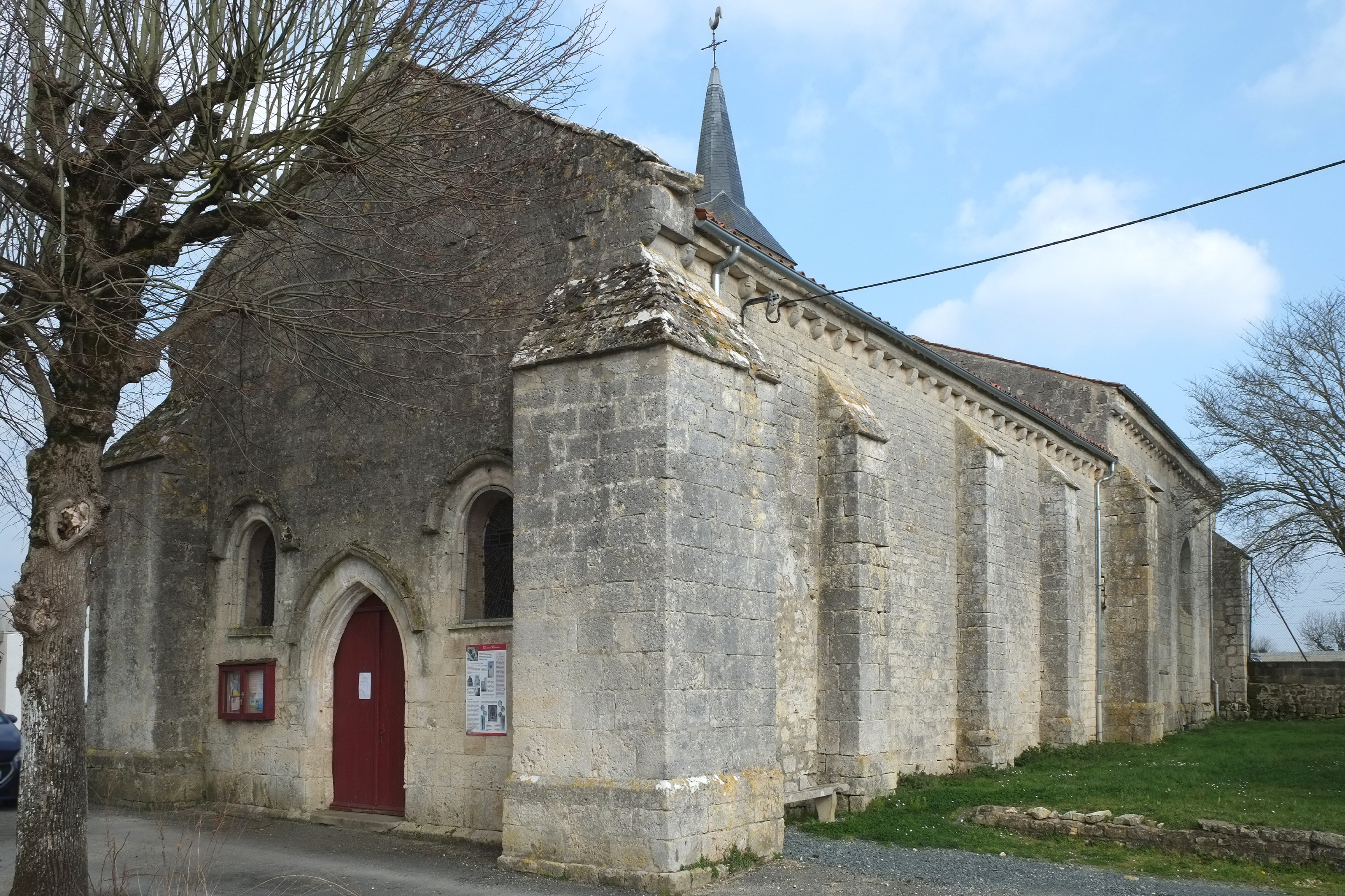 Église Saint-Pierre Landrais Charente-Maritime France